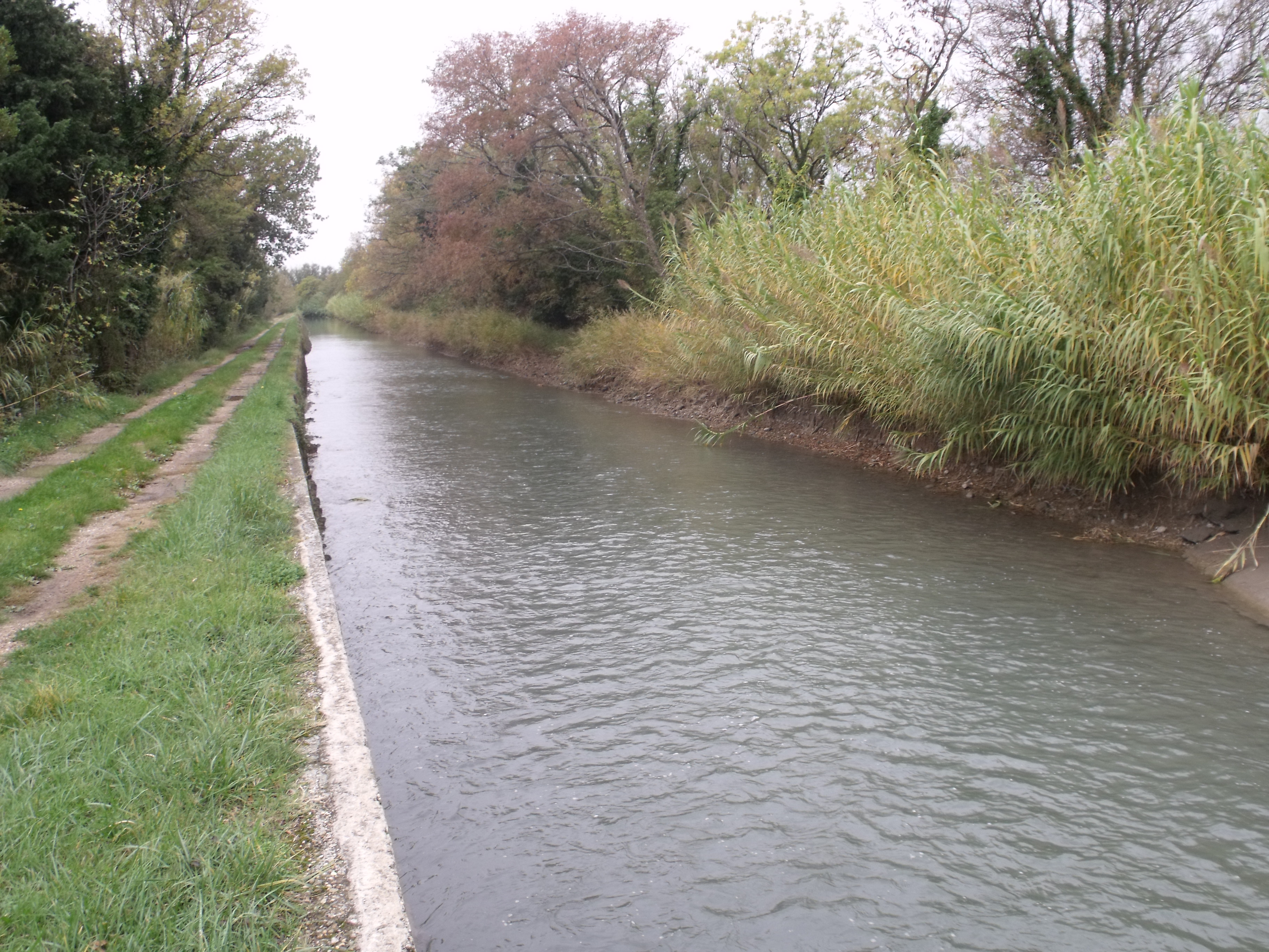 Canal de Craponne depuis la D25b (Aureille, Bouches-du-Rhône)